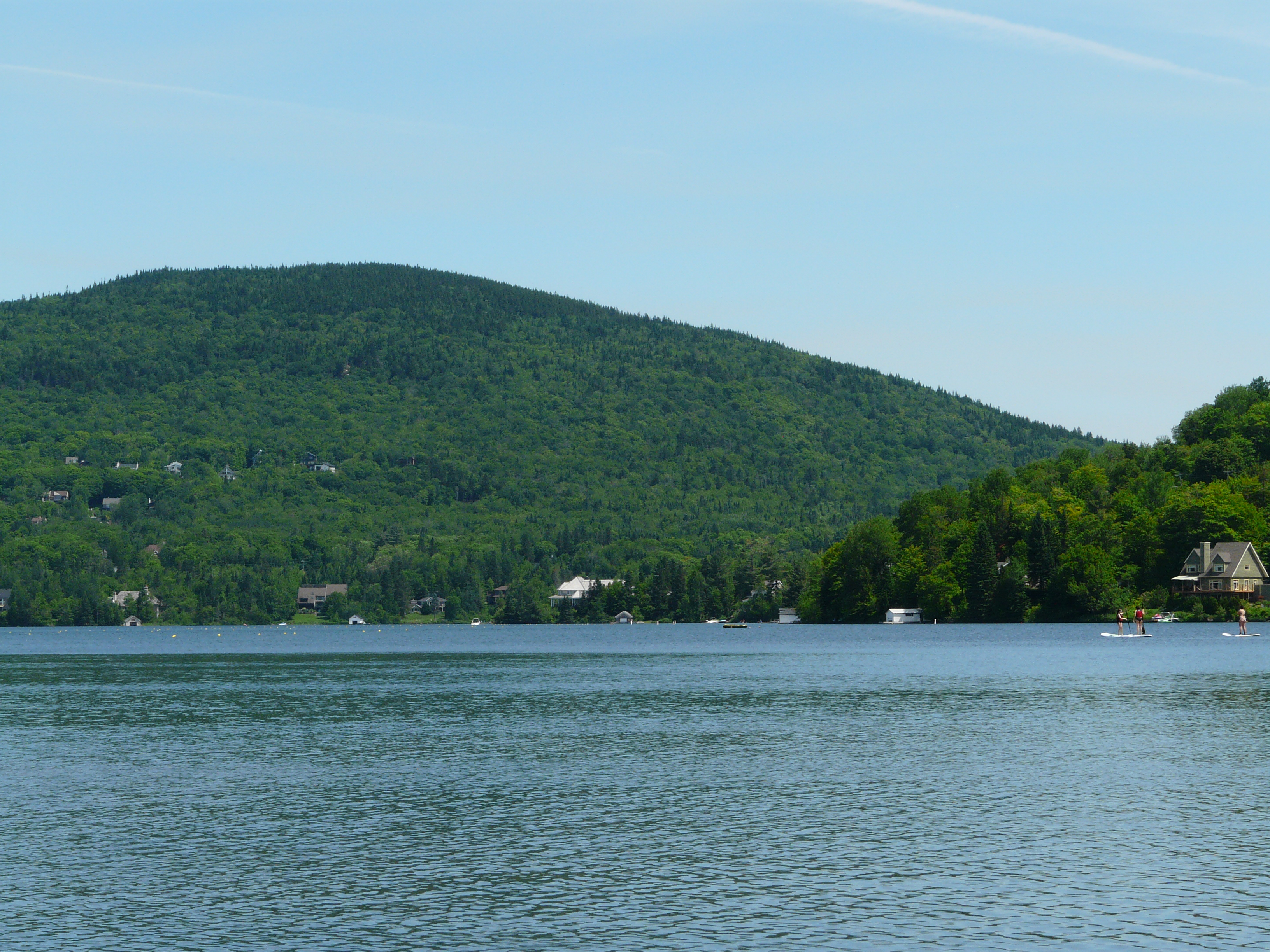 Mont Tourbillon, Québec